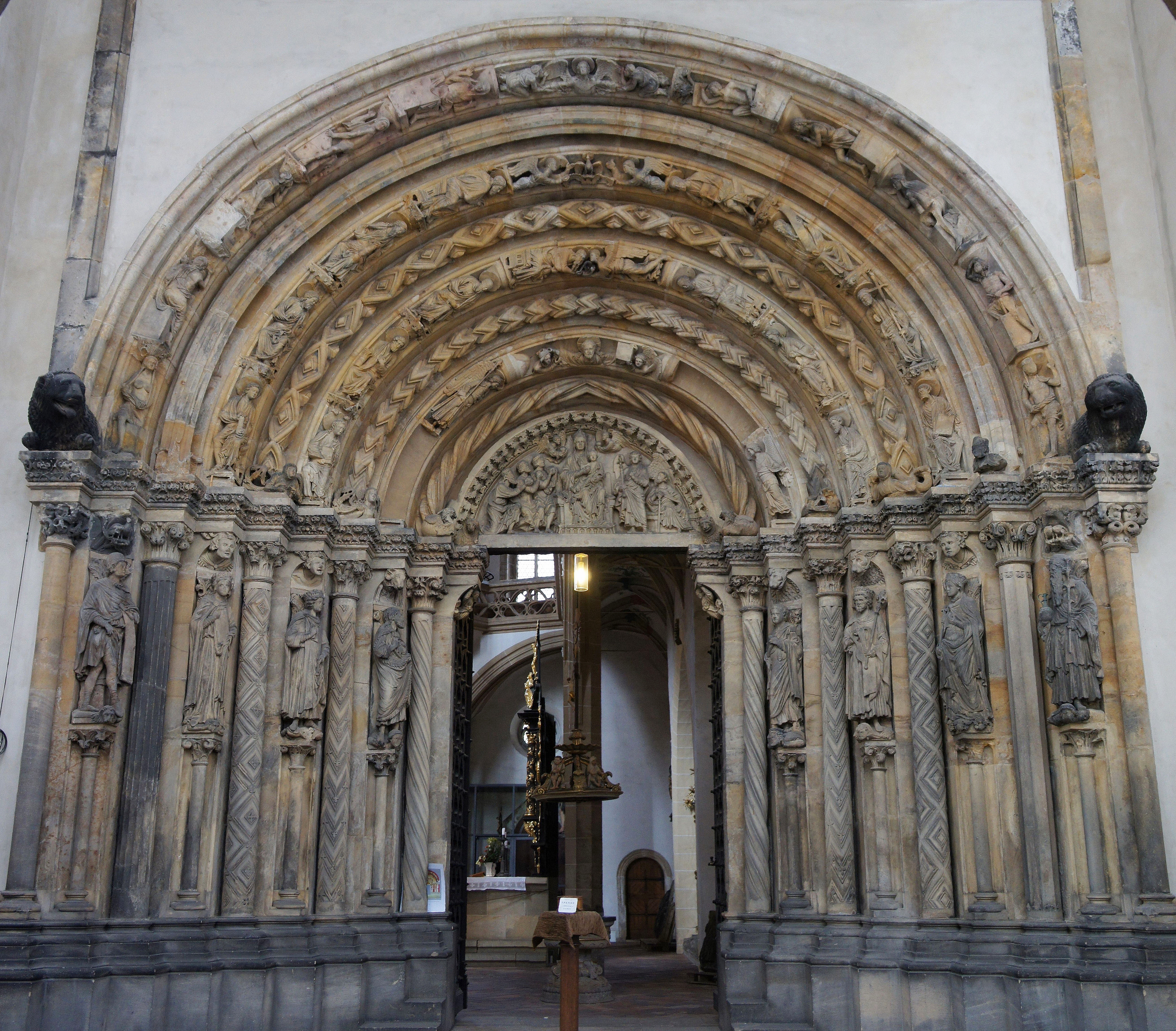 Der Dom zu Freiberg; - Google Maps - Google Earth Westportal der romanischen Marienkirche, die Goldene Pforte, um 1225/30